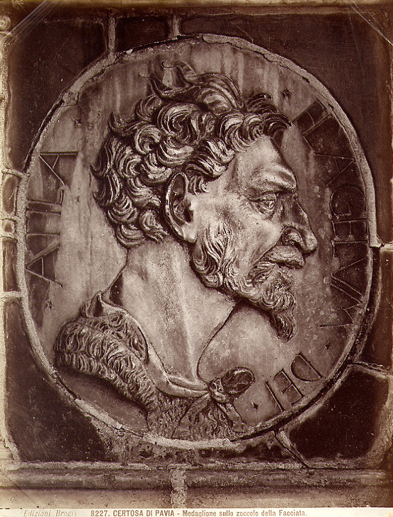 Brogi, Carlo (1850-1925), "Certosa di Pavia - Medaglione sullo zoccolo della facciata". L'iscrizione latina identifica il personaggio con "Attila, il flagello di Dio". Numero di catalogo: 8227.